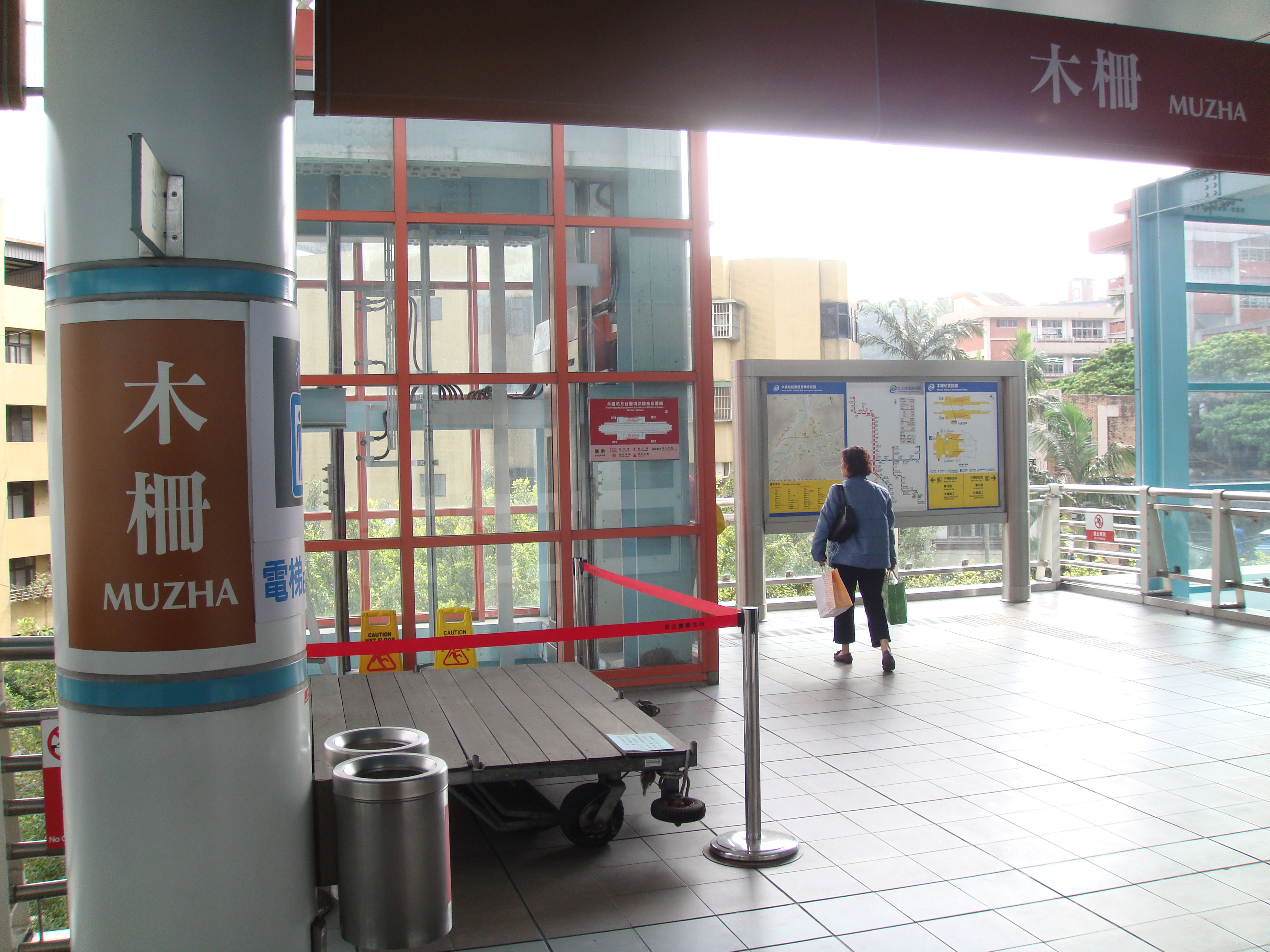 Muzha Station, Muzha Line, Taipei Metro, Taiwan.